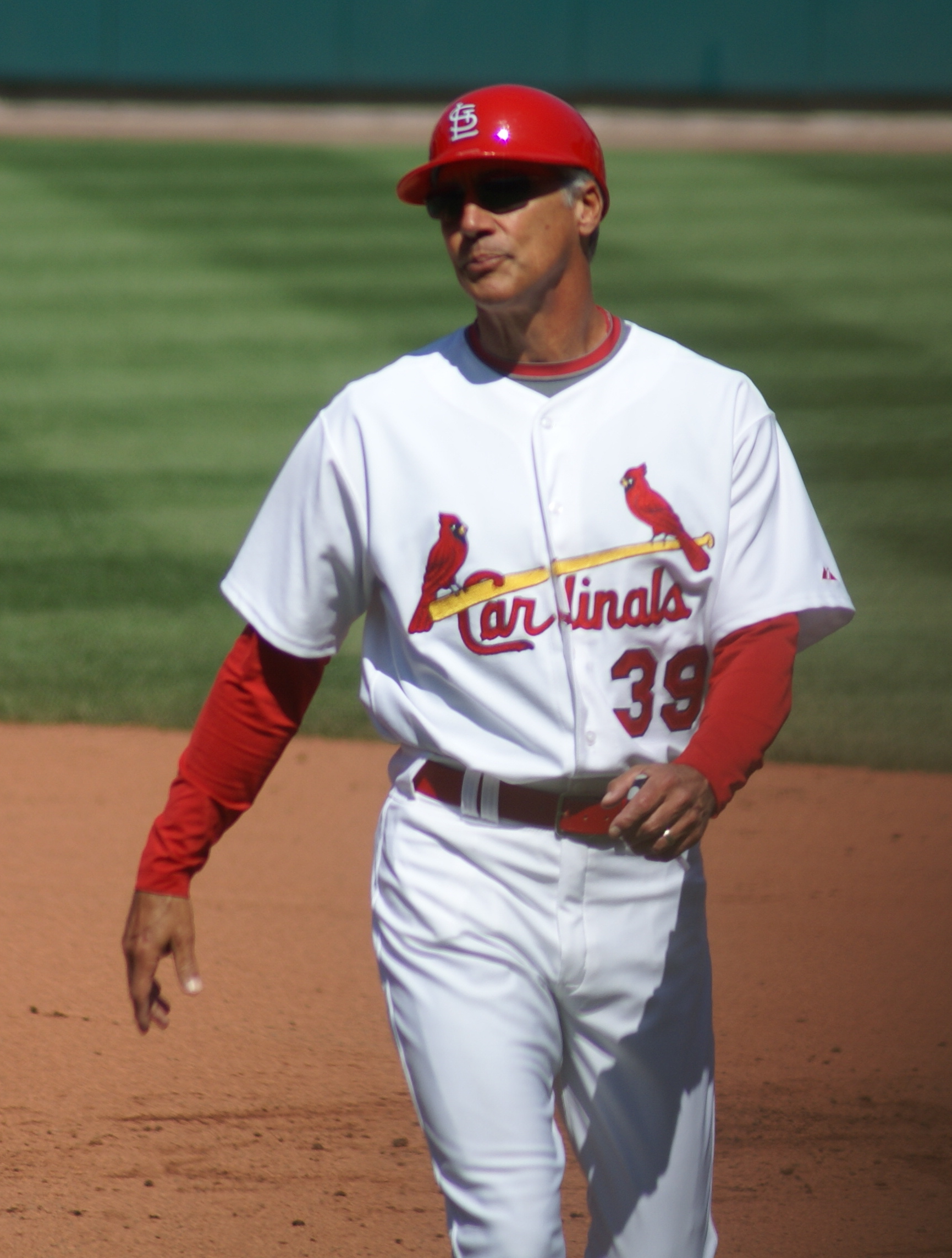 Dave McKay